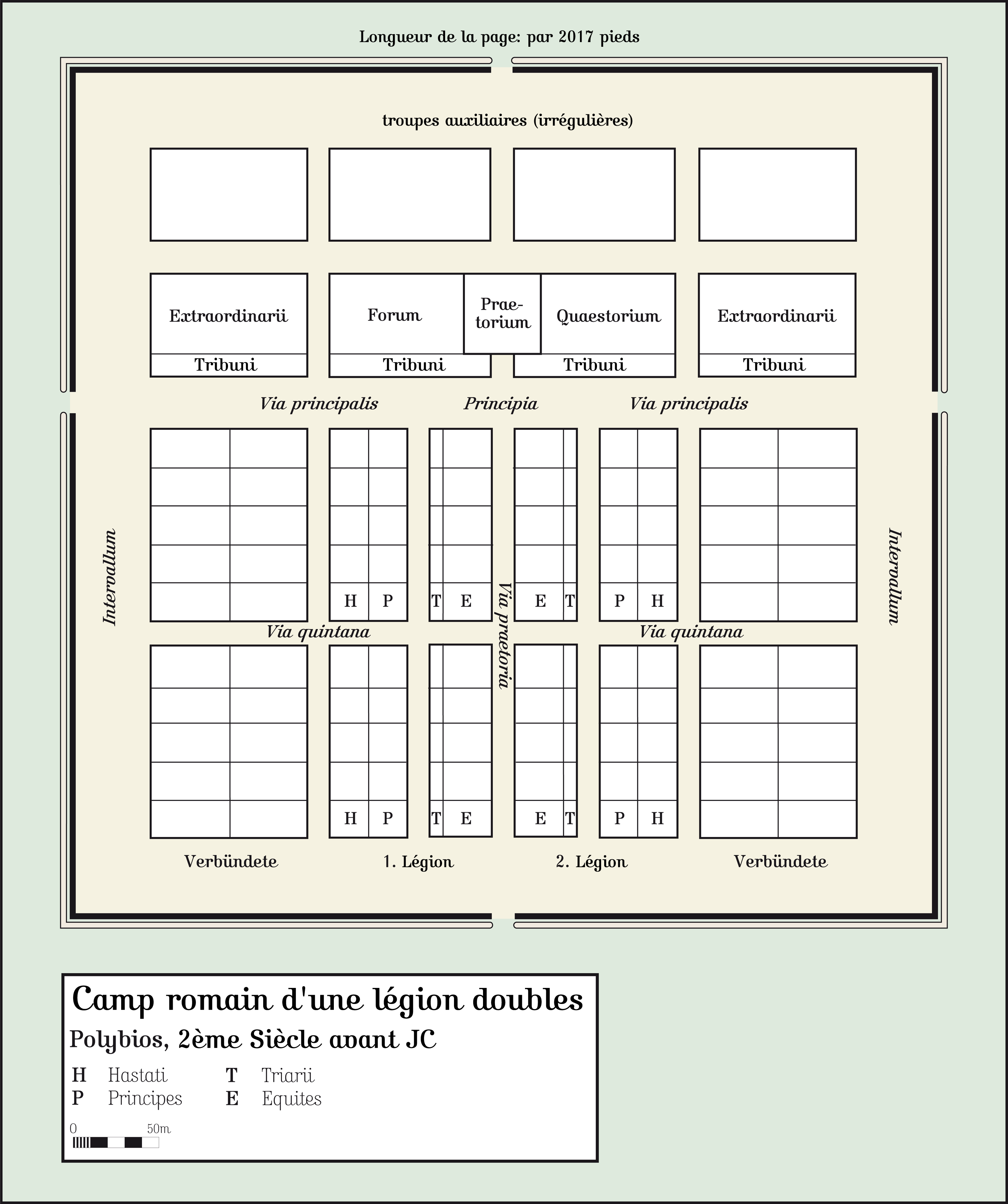 Schéma d'un camp du IIe siècle av. J.‑C. suivant la description de Polybe